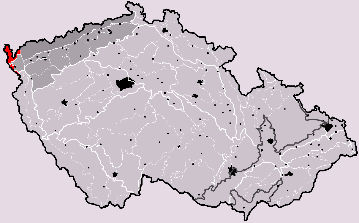 Poloha geomorfologického celku Smrčiny v rámci České republiky. Hercynský systém Hercynská pohoří I Česká vysočina I3 (III) Krušnohorská subprovincie I3A (IIIA) Krušnohorská hornatina I3A-1 (IIIA-1) Smrčiny